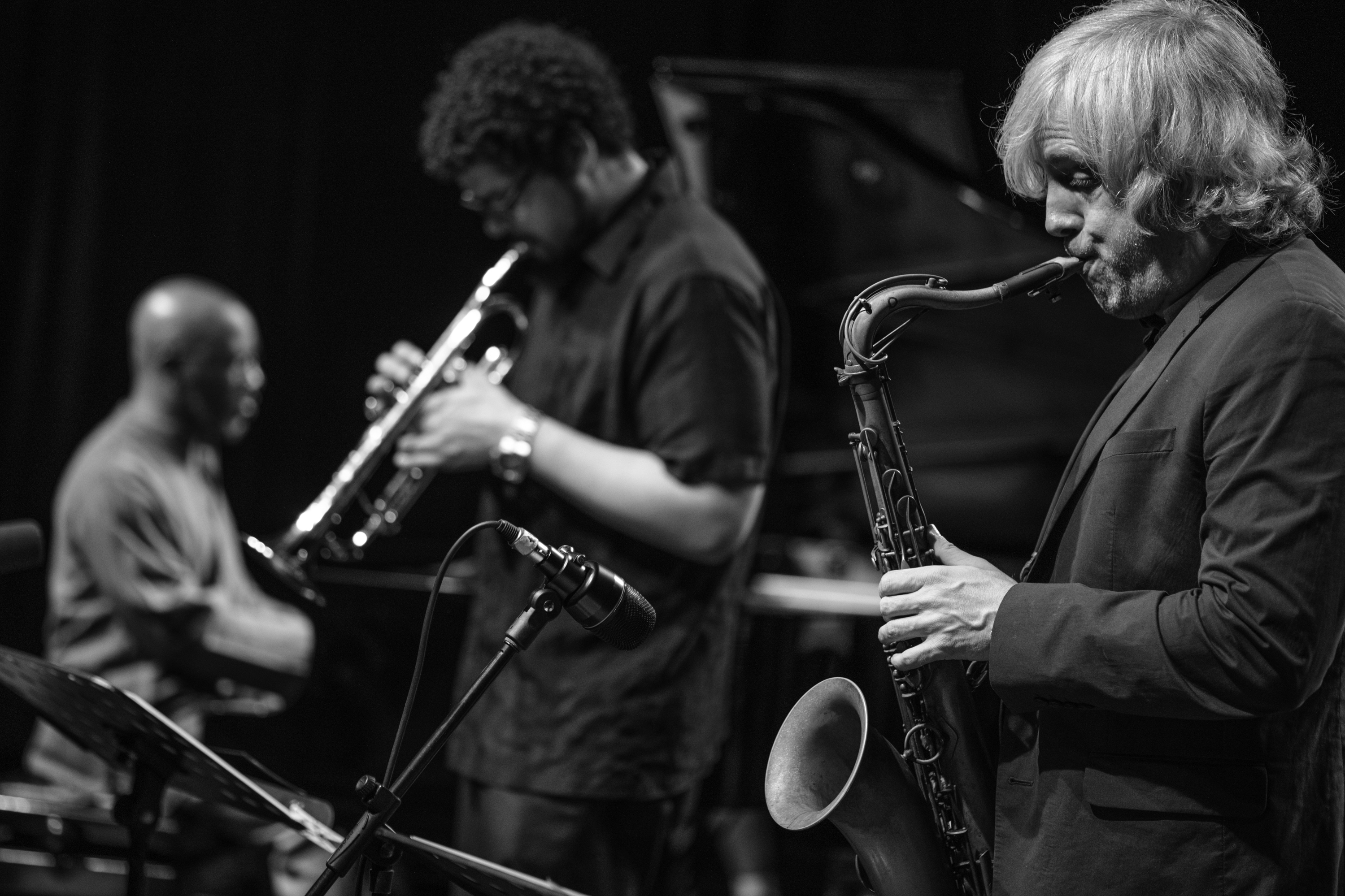 Luques Curtis / bajo Mark Whitfield Jr / batería Josh Evans / trompeta Orrin Evans / piano Invitado especial: Grant Stewart / saxo tenor 21 Festival Internacional de Jazz de Punta del Este El Sosiego, Punta del Este, Maldonado, Uruguay Camera: Canon EOS 5D Mark IV Lens: Zeiss Makro-Planar T* 2/100 ZE Focal Length: 100 mm Exposure: ¹⁄₃₅₀ sec at f/2.0 ISO: 1600